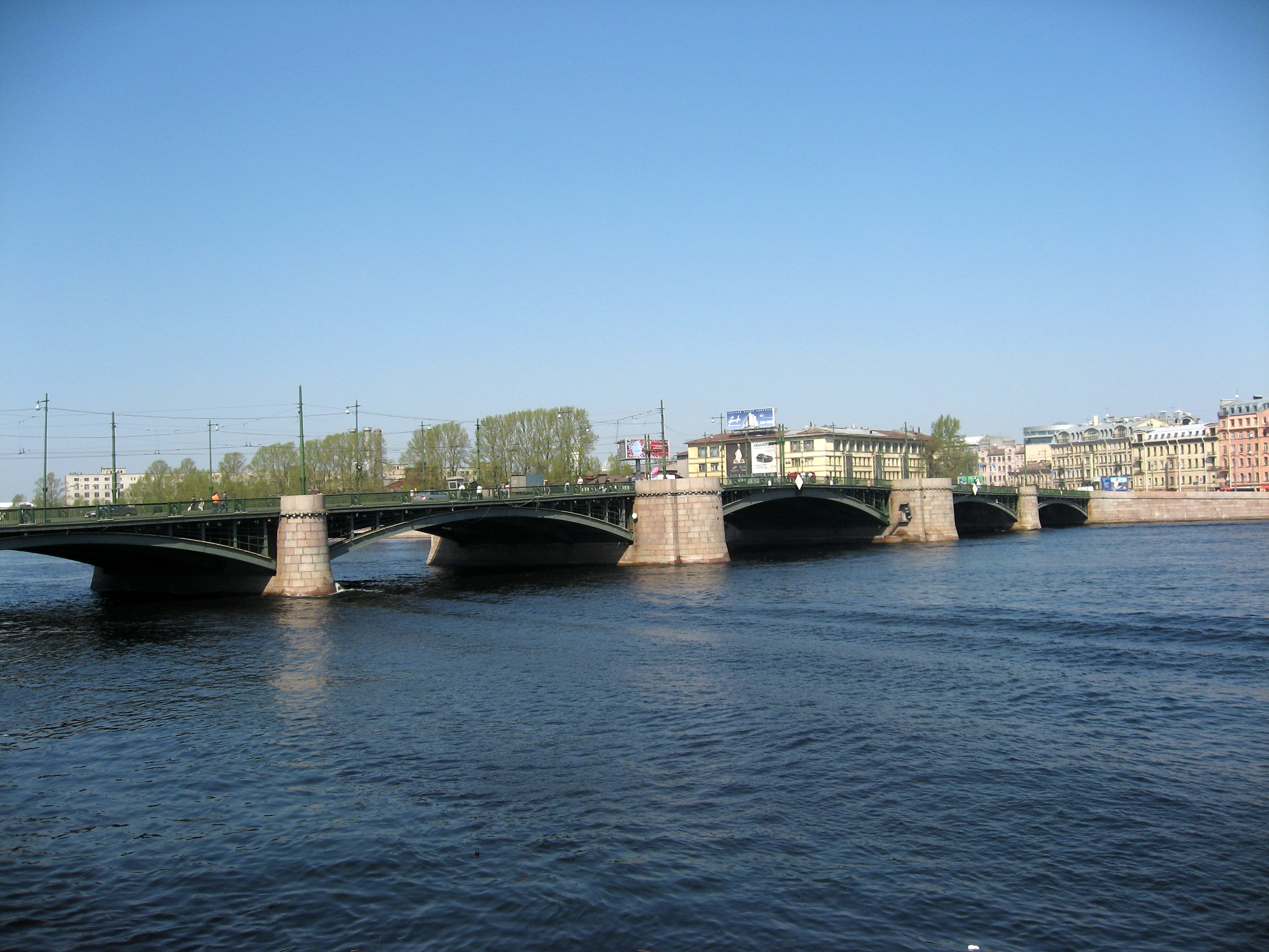 Sankt-Petěrburg (Petrohrad), most přes Něvu